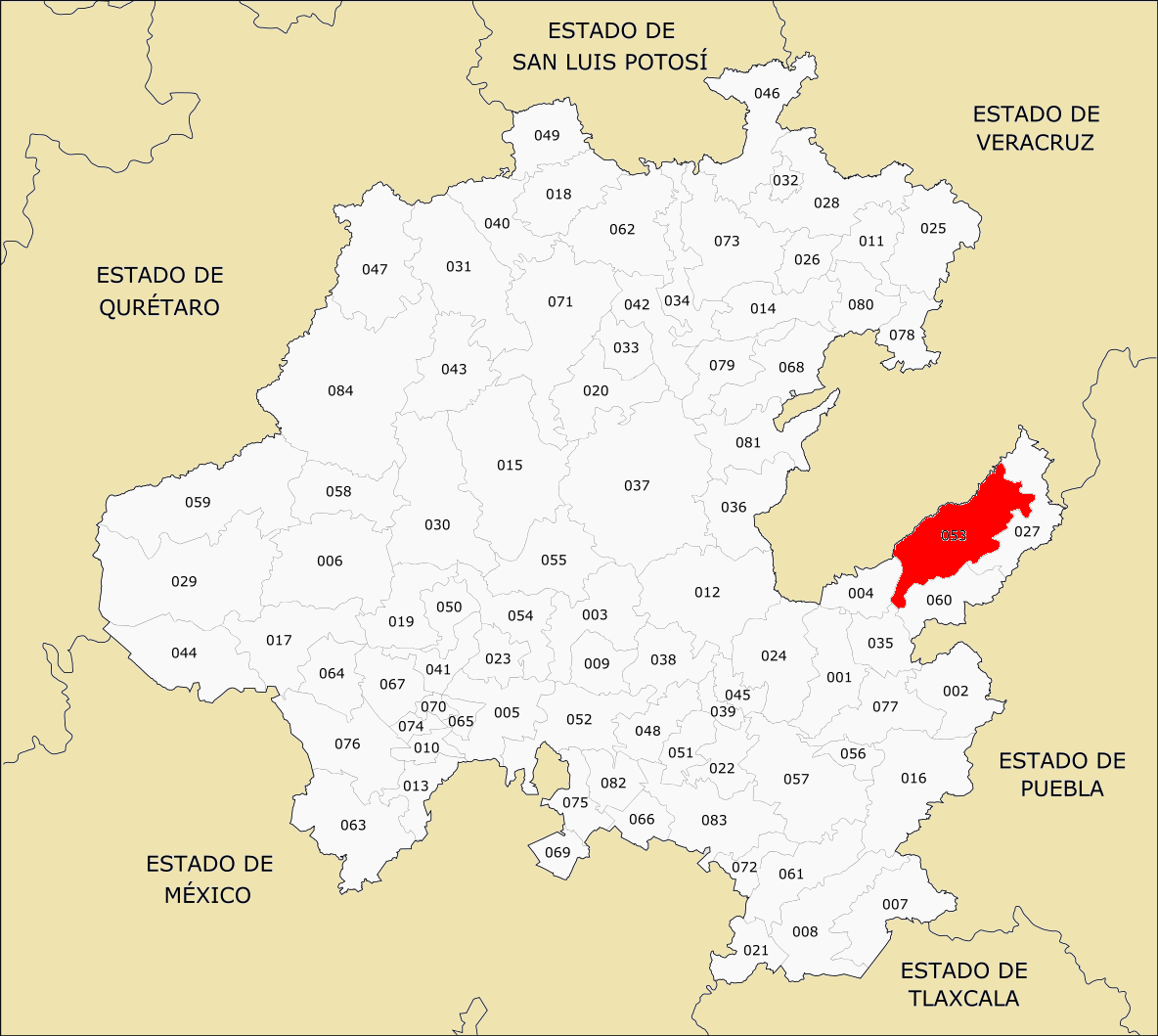 Municipio de Hidalgo